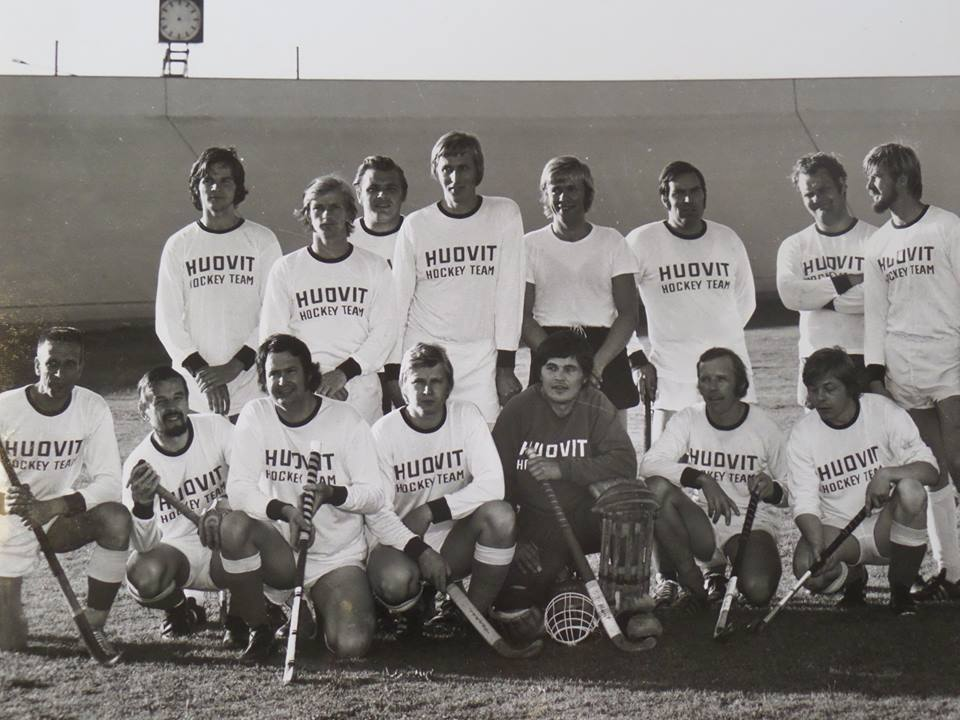 Huovit hallitsivat maahockeyn SM-sarjaa voittaen peräti 17 Suomenmestaruutta. Huovit pitää yhä hallussaan perättäisten Suomen mestaruuksien ennätystä olympiapalloilulajeissa 13:sta mestaruuden putkellaan v. 1970-1982. Ensimmäisen mestaruutensa joukkue voitti v. 1958 ja viimeisimmän v. 1982